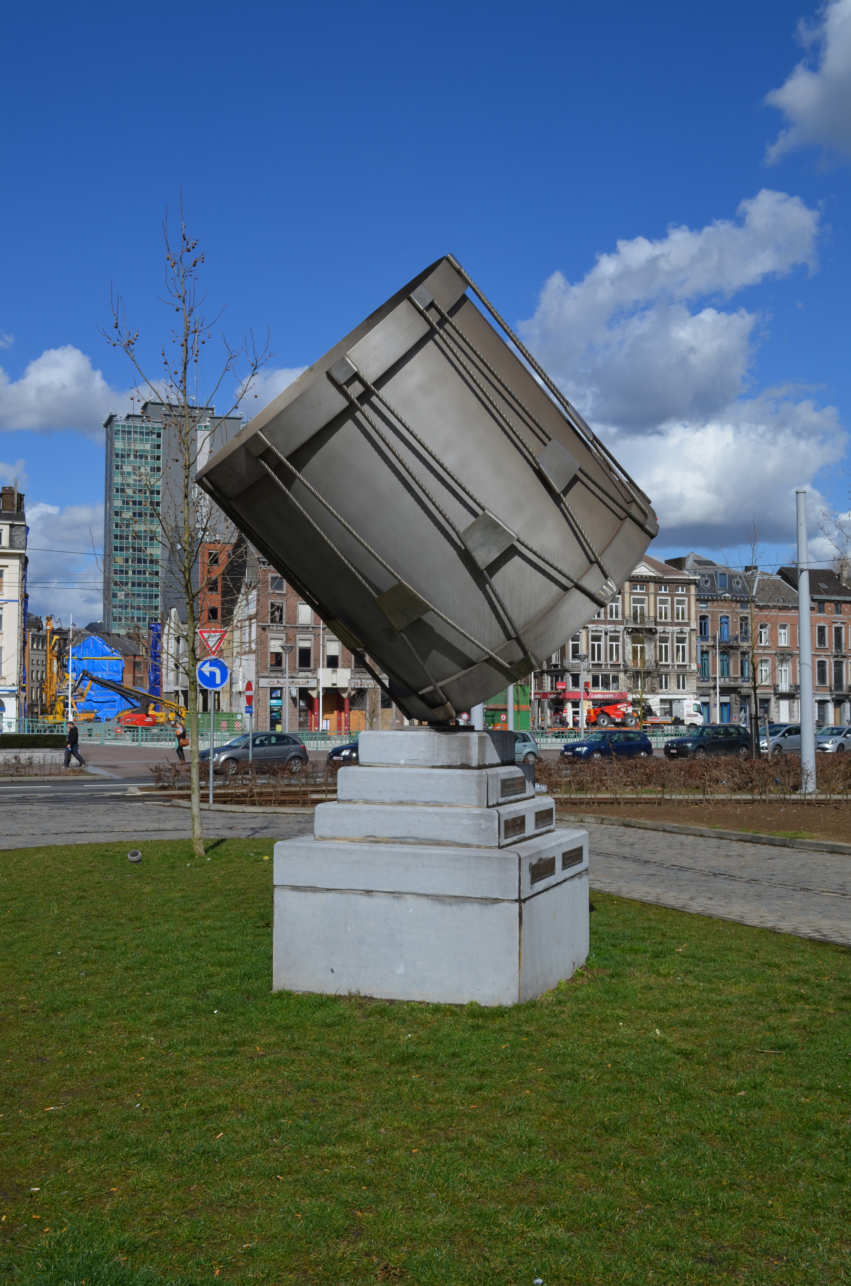 Charleroi - Monument aux Armées françaises - inauguré le 19 septembre 1997.